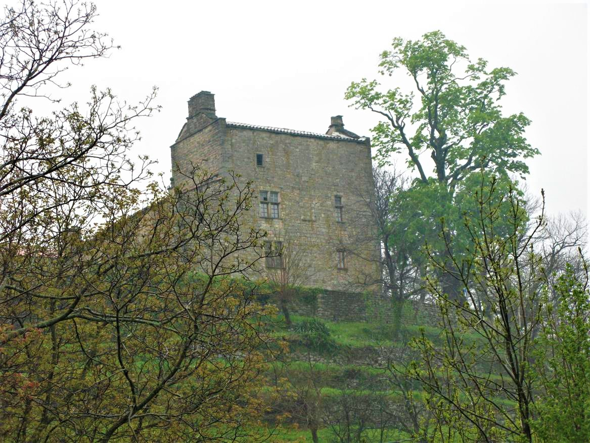 Village de Valgorge (Ardèche)